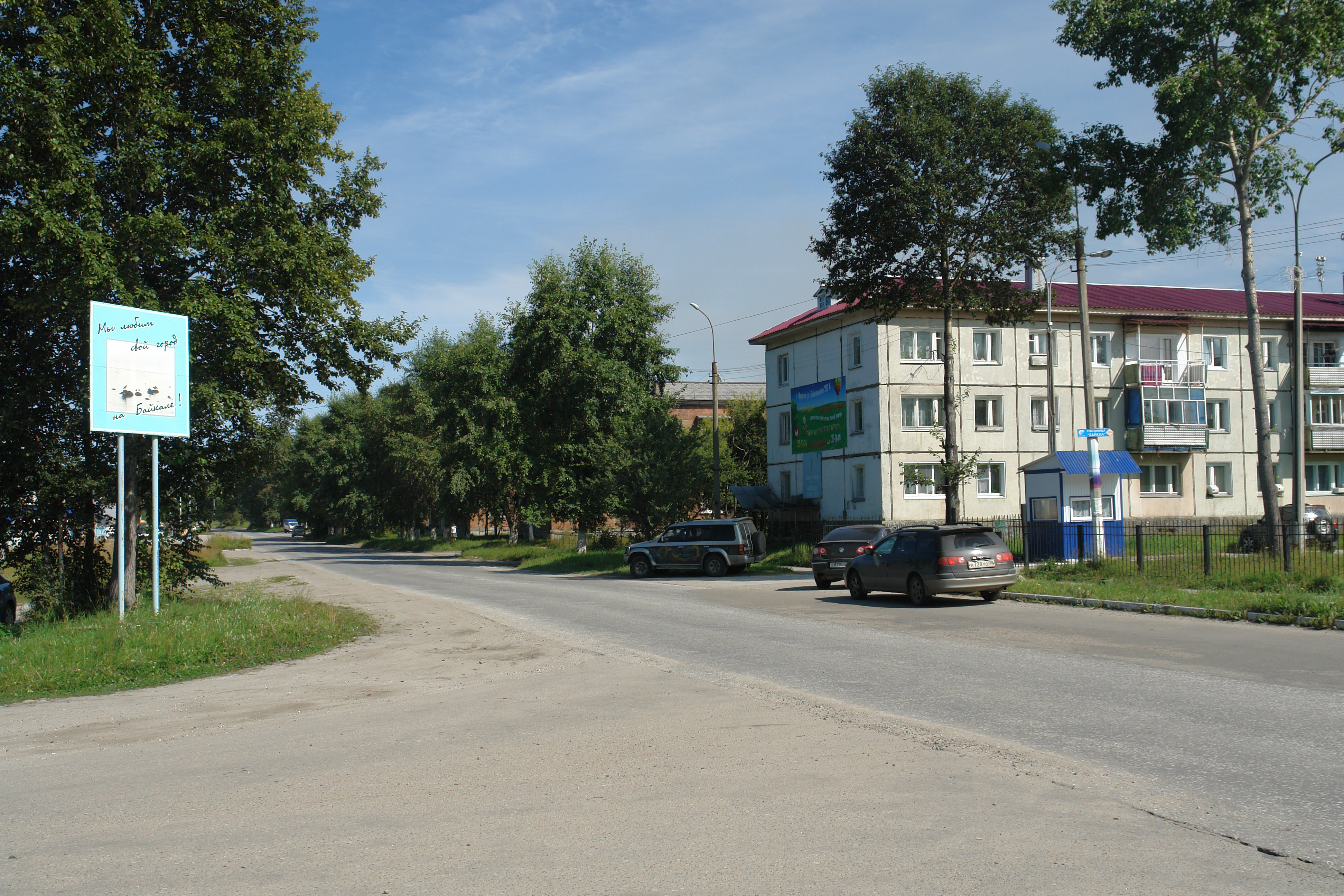 Одна из улиц Байкальска